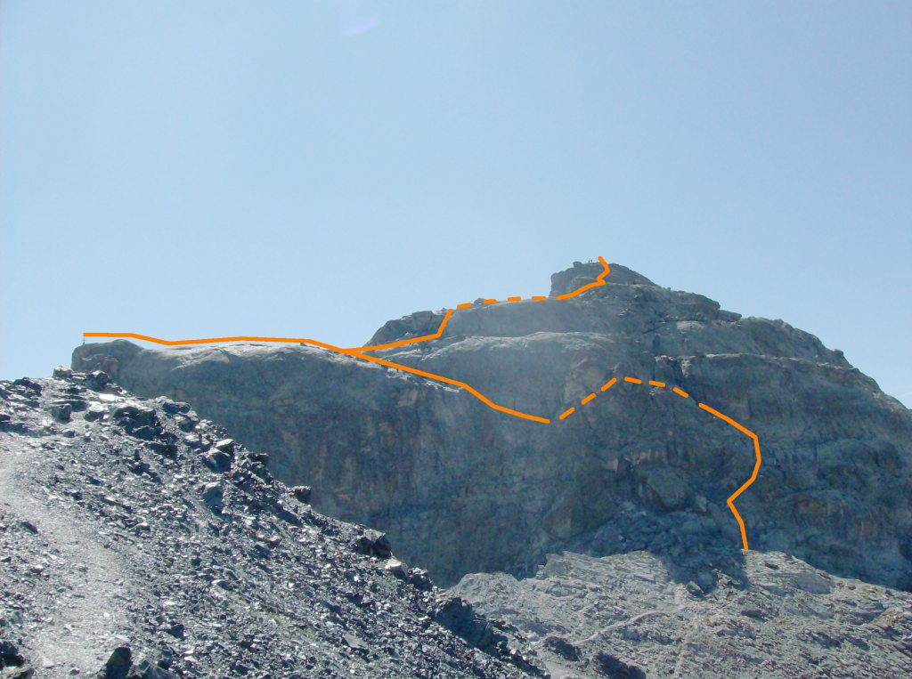 Rocca Bianca (Val Varaita) - percorso della via normale